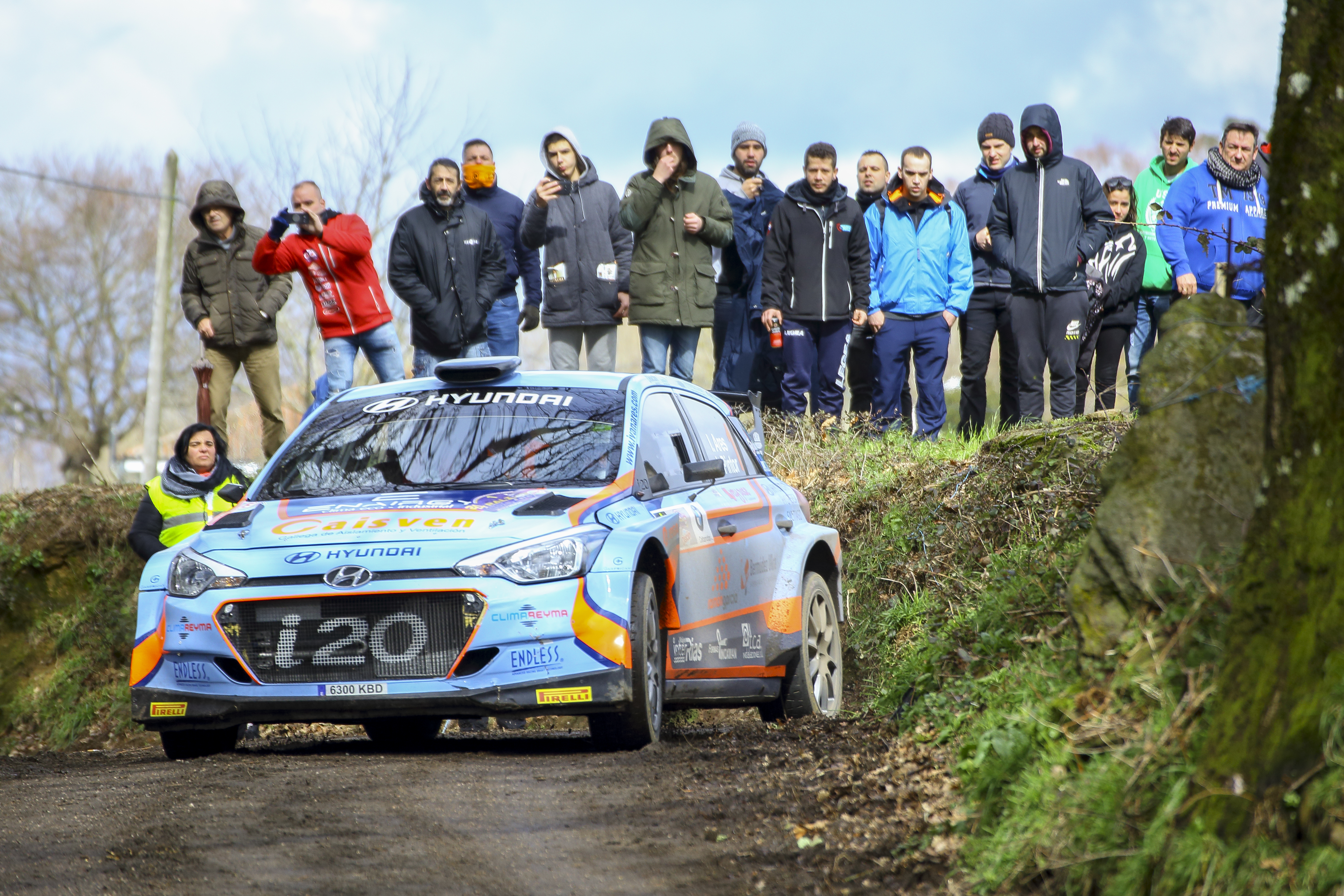 Prime prueba puntuable para el CERA, disputada en Lalín. Iván Ares se hizo con la victoria, en dos días marcados por el volumen de agua sobre el asfalto.